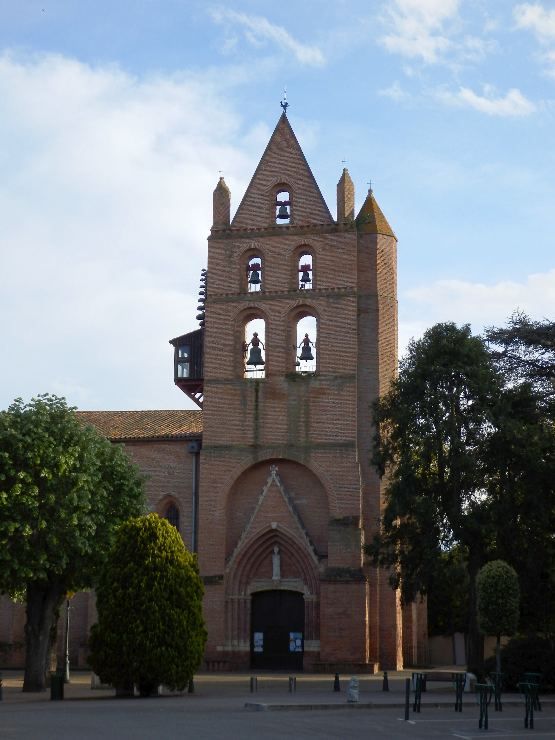 Clocher du XIV de l’église saint-Martin à Portet-sur-Garonne classée aux monuments historiques.